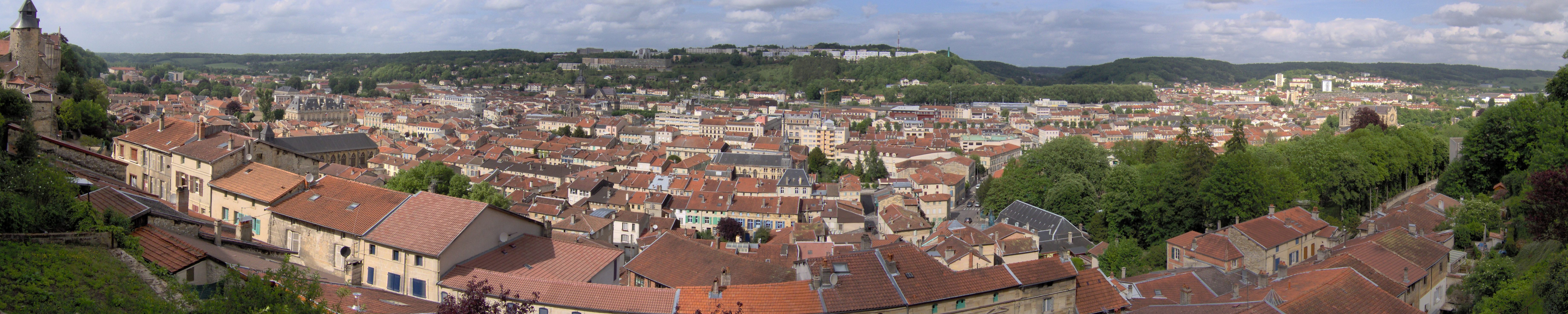 panorama de Bar-le-Duc : la Ville Basse et la Côte Sainte Catherine. Photo prise depuis le belvédère des Grangettes en Ville Haute